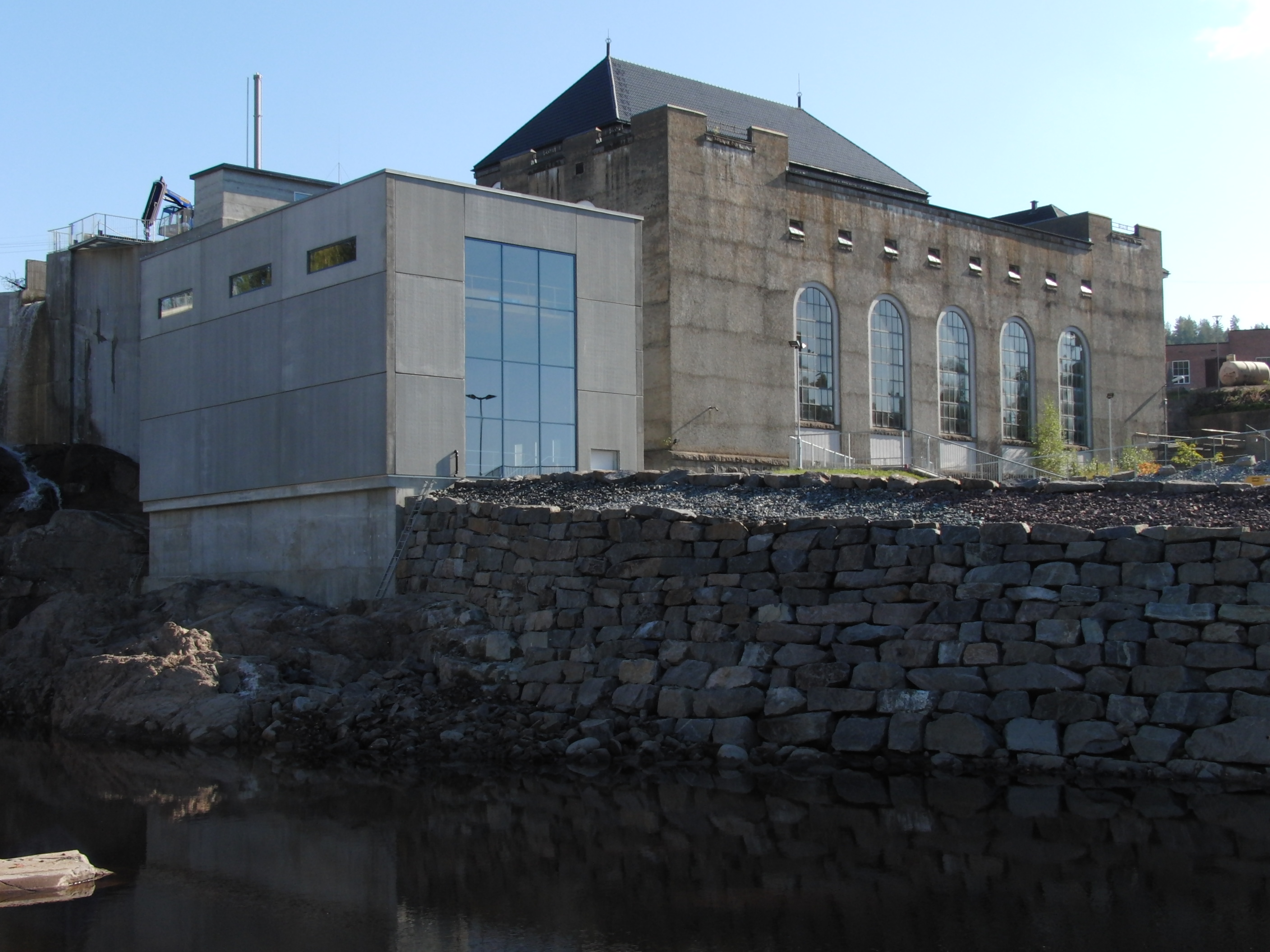 Vittingfoss kraftverk 2014